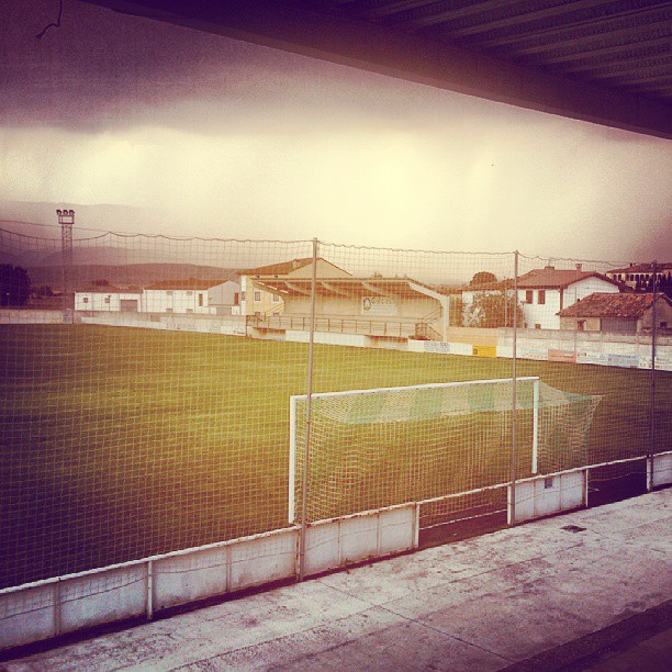 Campo Municipal Jesús María Pereda